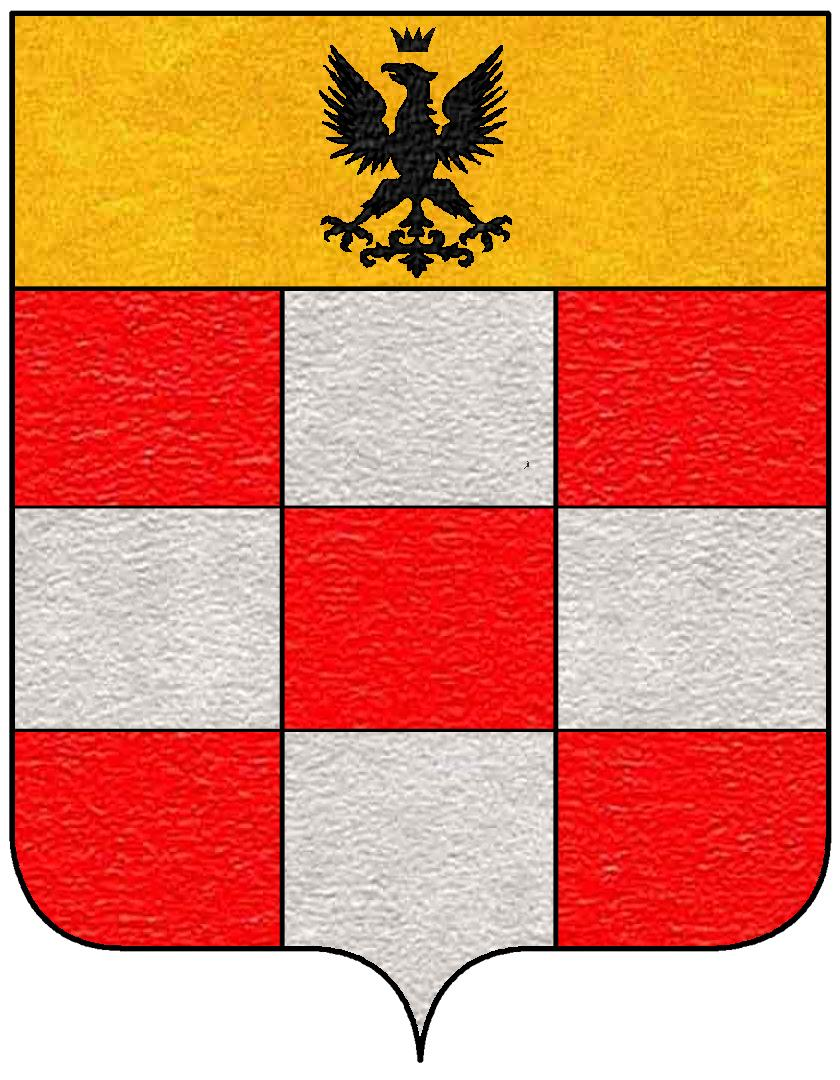 Stemma della famiglia Pallavicino